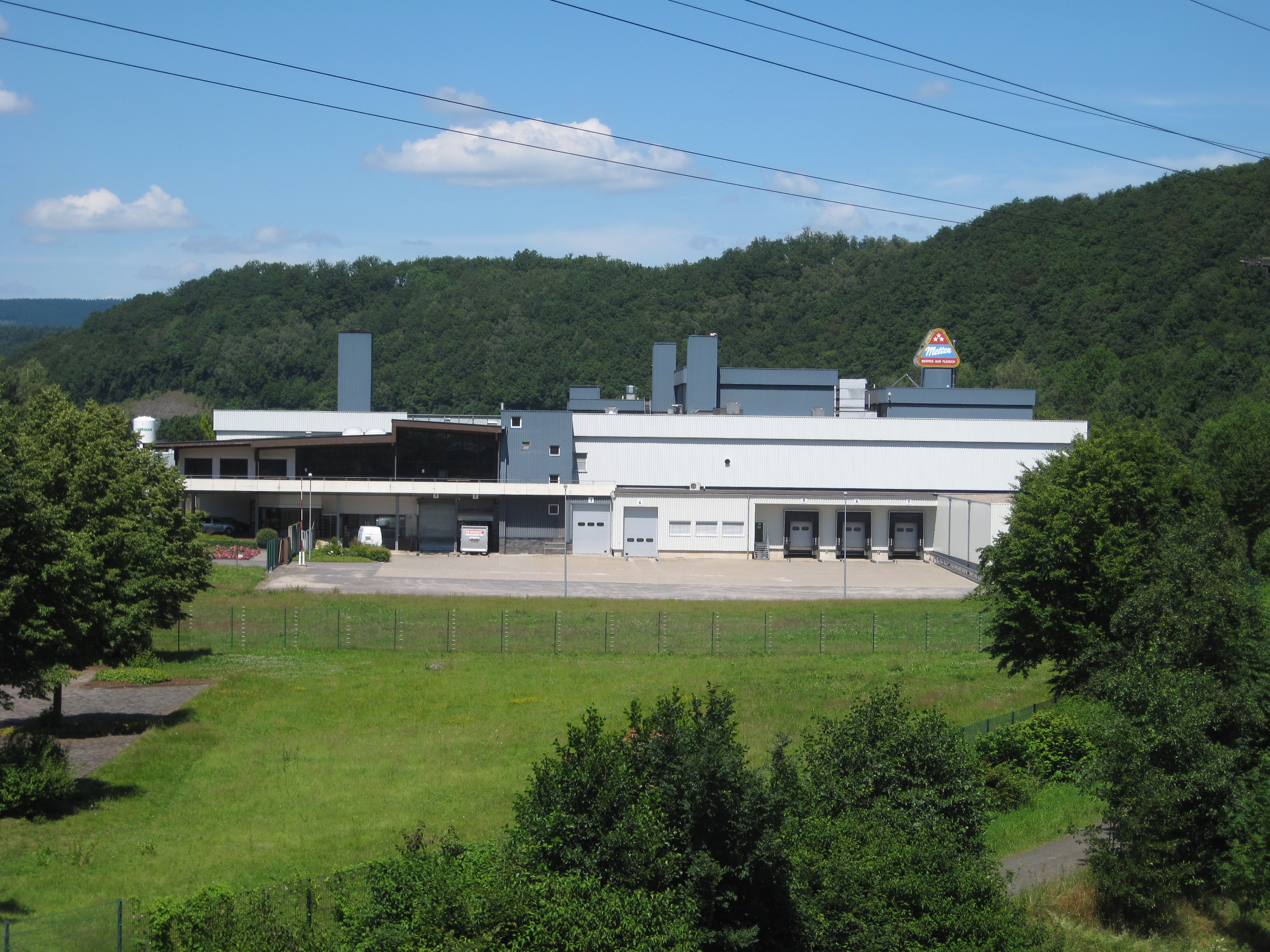 Metten Fleischwaren in Finnentrop im Industriegebiet Frielentrop.